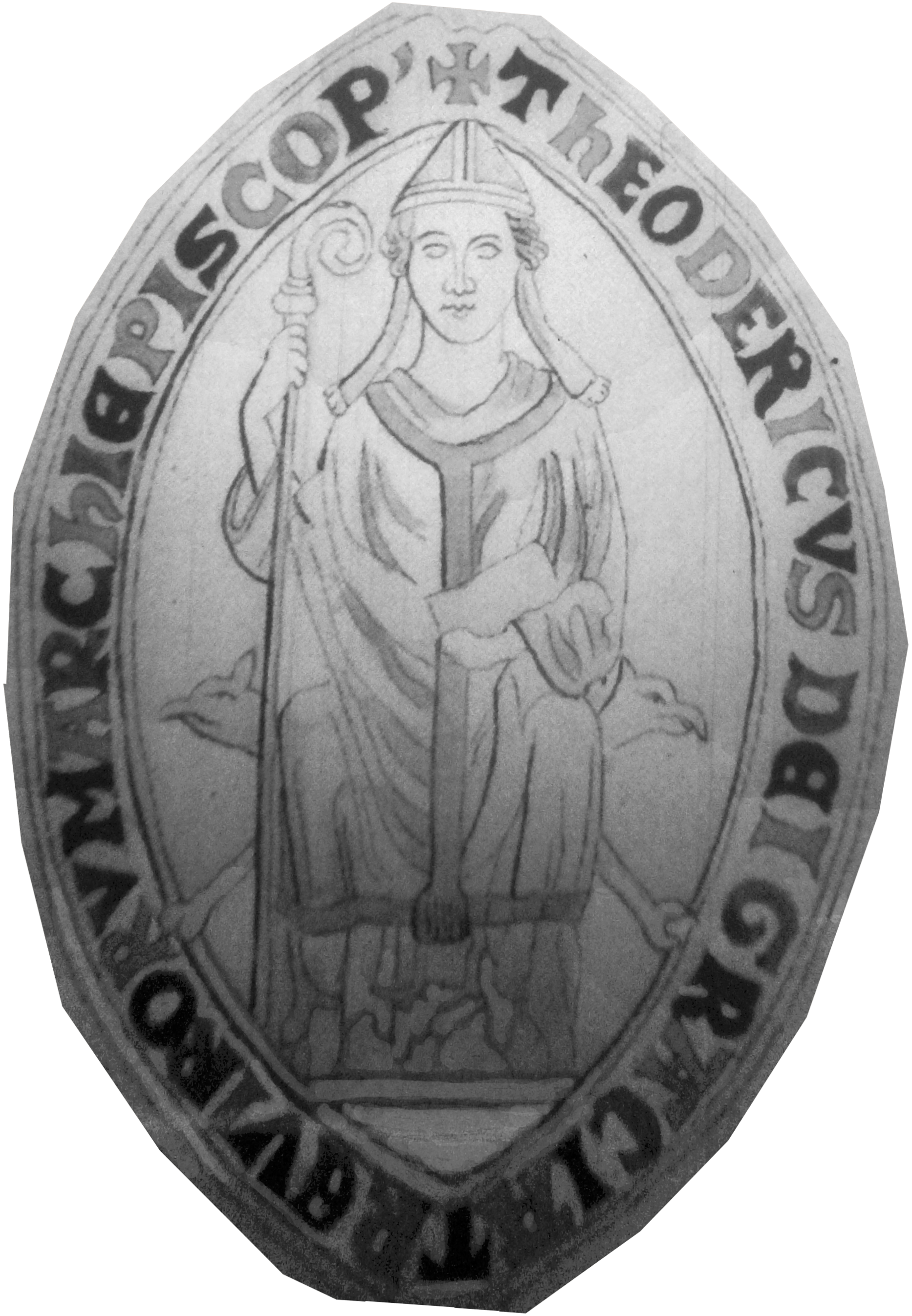 cf le titre.